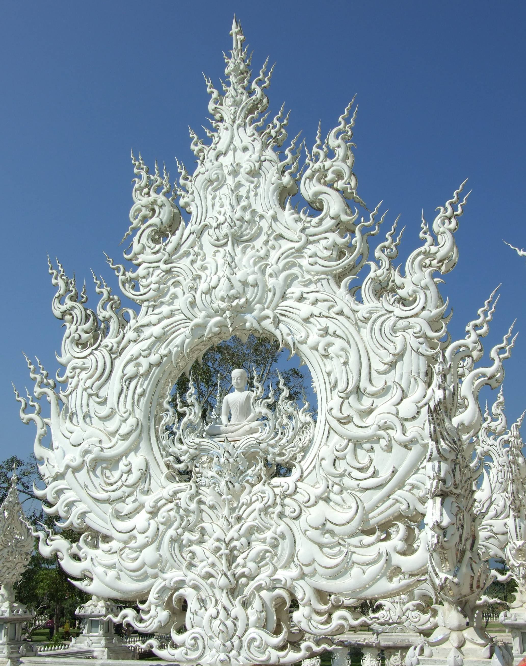 Wat Rong Khun, Chiang Rai, Nord-Thailand